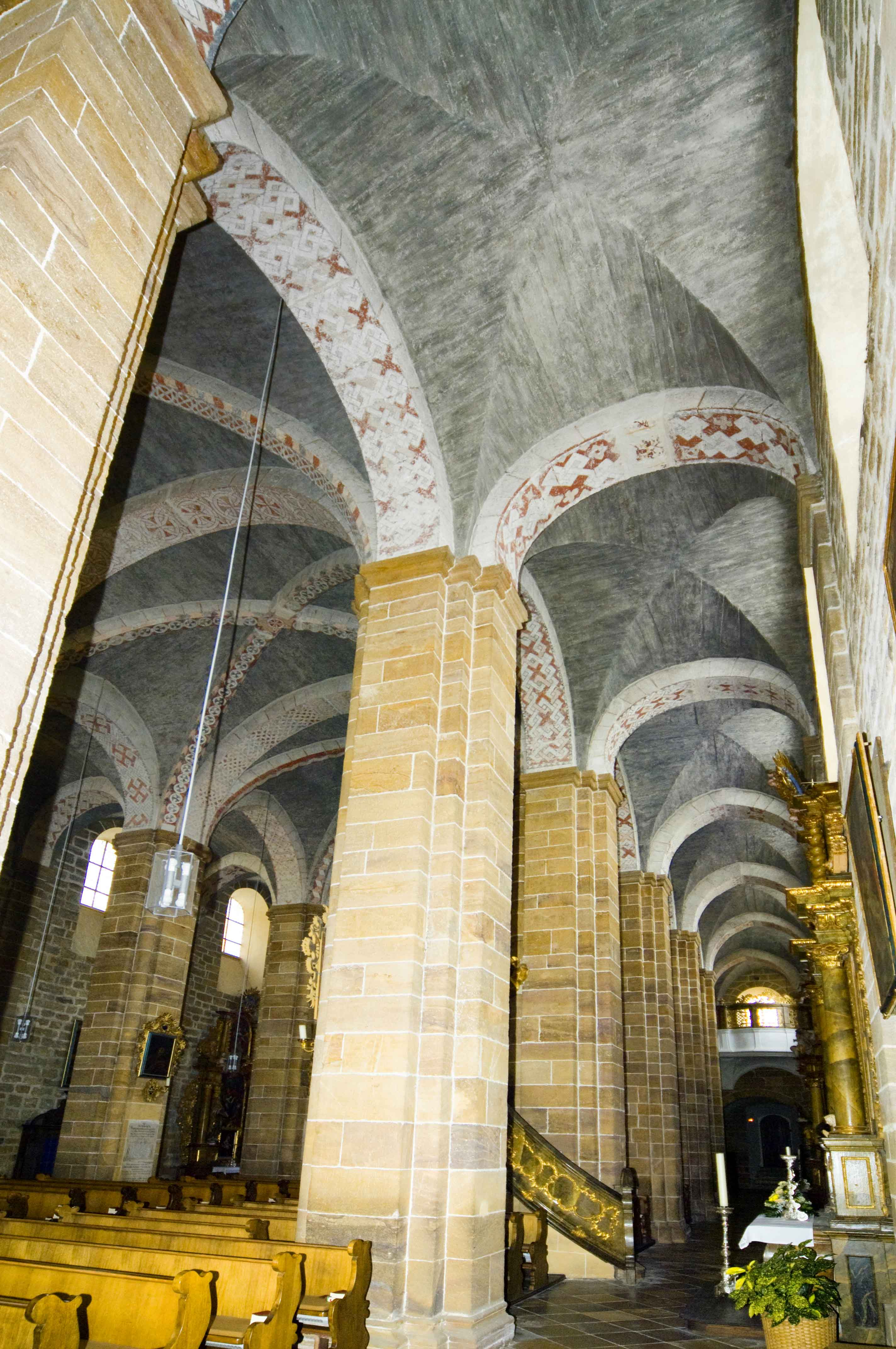 Kirchenansicht Kloster Walderbach, Bayern